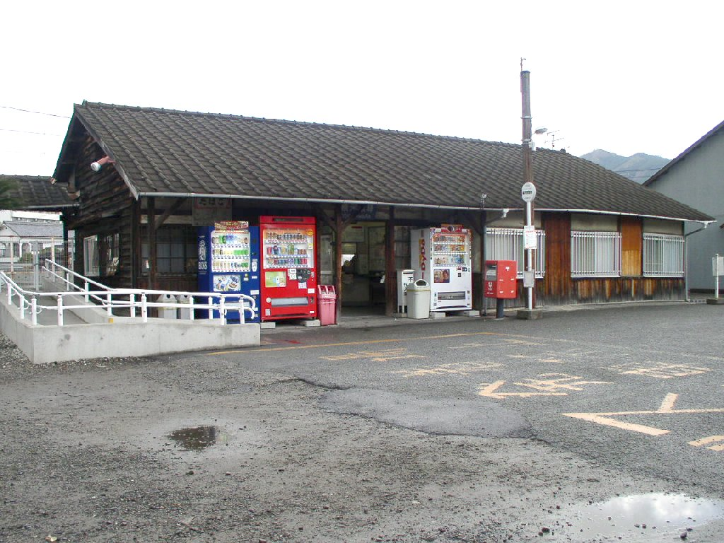 伊予鉄道/横河原線/横河原駅（Yokogawara Sta.）/駅舎